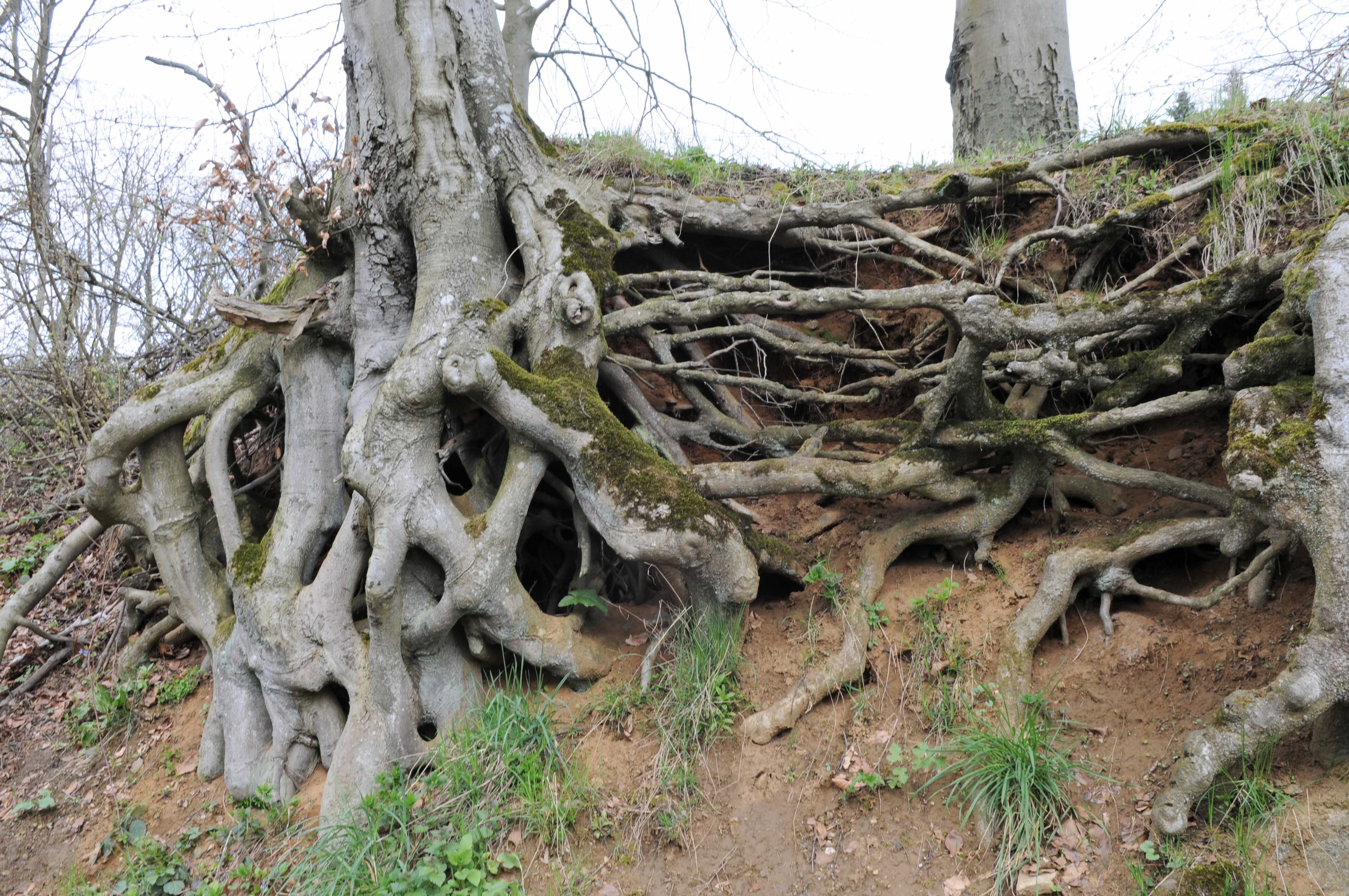 Buchen um Kéibuer zu Hesper.